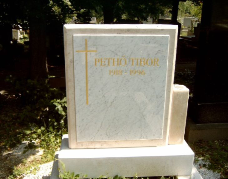 Pethő Tibor (Budapest, 1918 - 1996) újságíró. (1942-től, majd 1960-tól ismét a Magyar Nemzet főmunkatársa, később szerkesztőjének sírja Budapesten. Farkasréti temető: 20/1-1-478